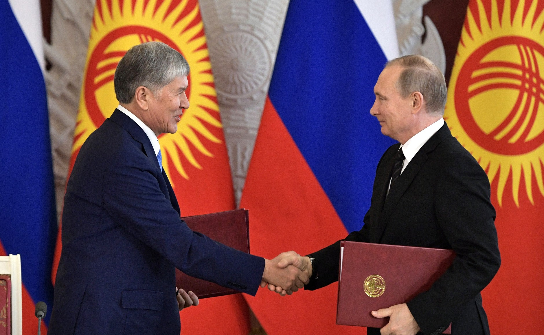 Владимир Путин и Алмазбек Атамбаев подписали Декларацию об укреплении союзничества и стратегического партнёрства между Российской Федерацией и Киргизской Республикой